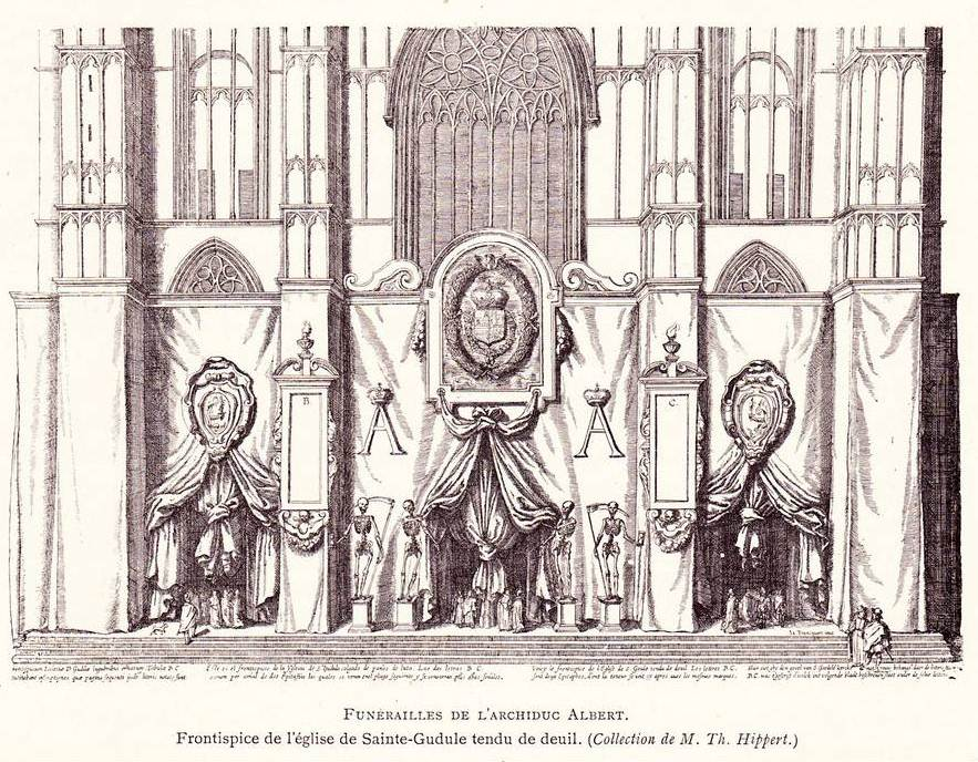 La façade de la cathédrale Sainte Gudule à Bruxelles tendue de deuil pour les funérailles de l'Archiduc Albert (1621)